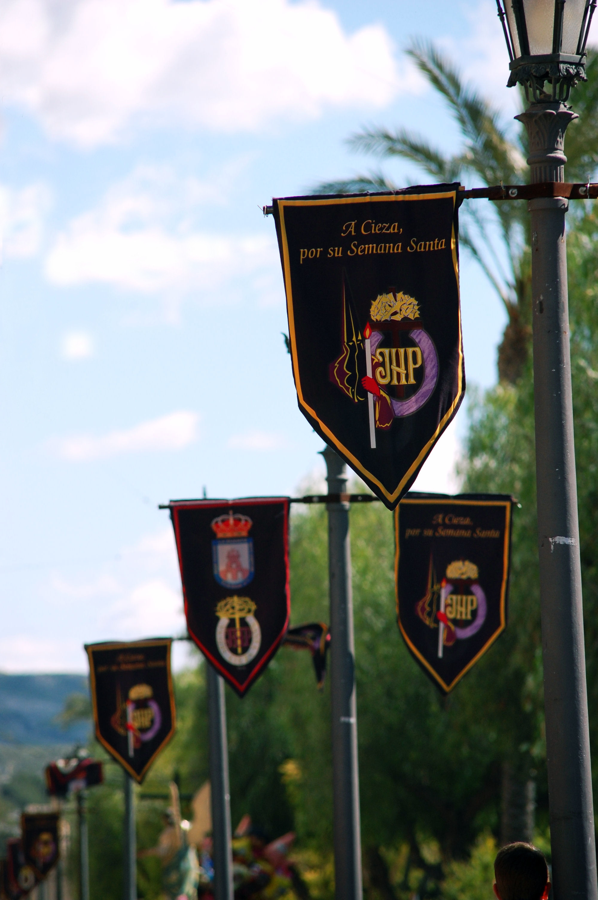 Galas colgadas en las farolas de Cieza durante la Semana Santa Ciezana